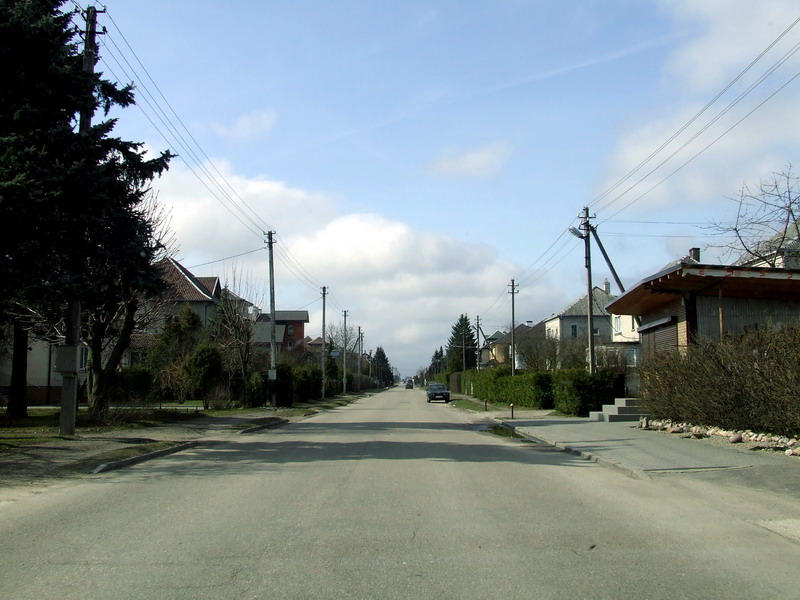 Gėlių gatvė, Ringaudai, Kauno raj.